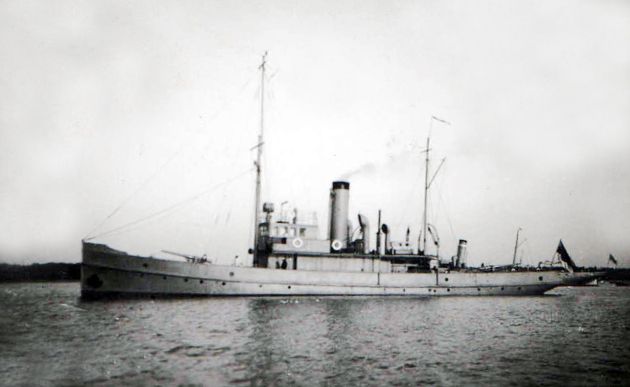 Estońska kanonierka „Laine”, lata 30-te.